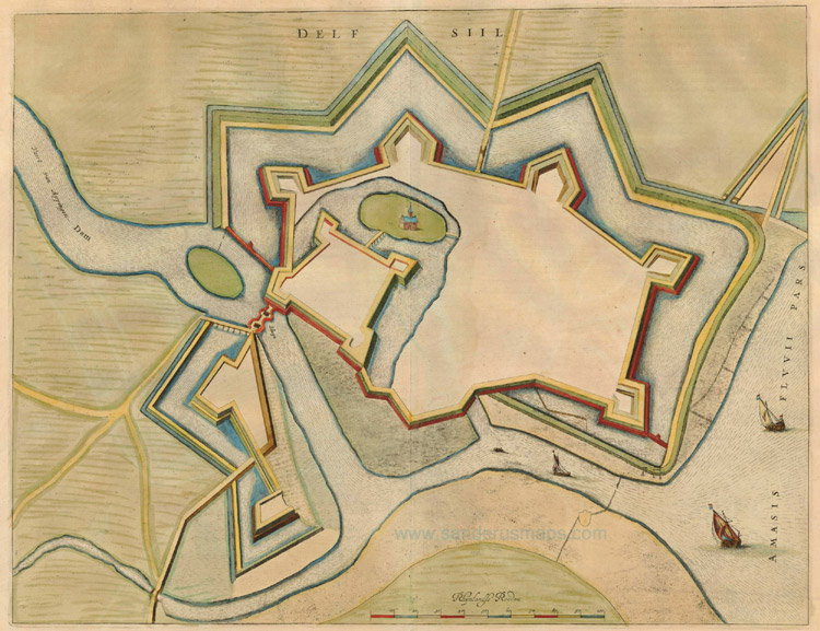 title: Delfsiil; size 40cm x 52cm